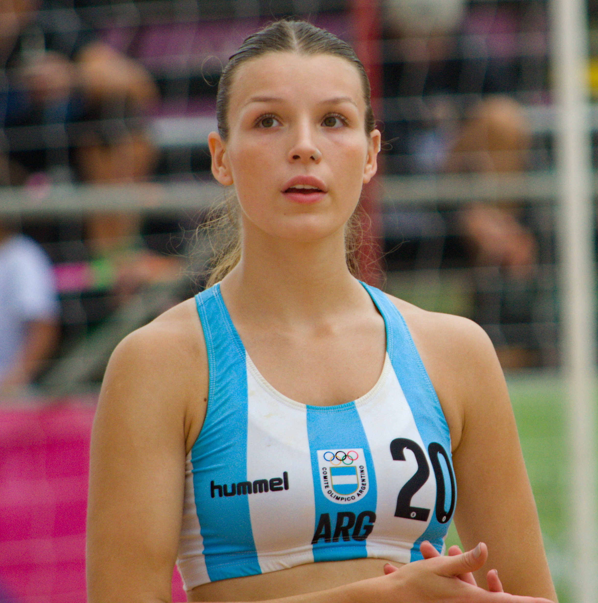 Partido de la semi-final femenina de handball entre Argentina y Venezuela en los Juegos Suramericanos de Playa 2019